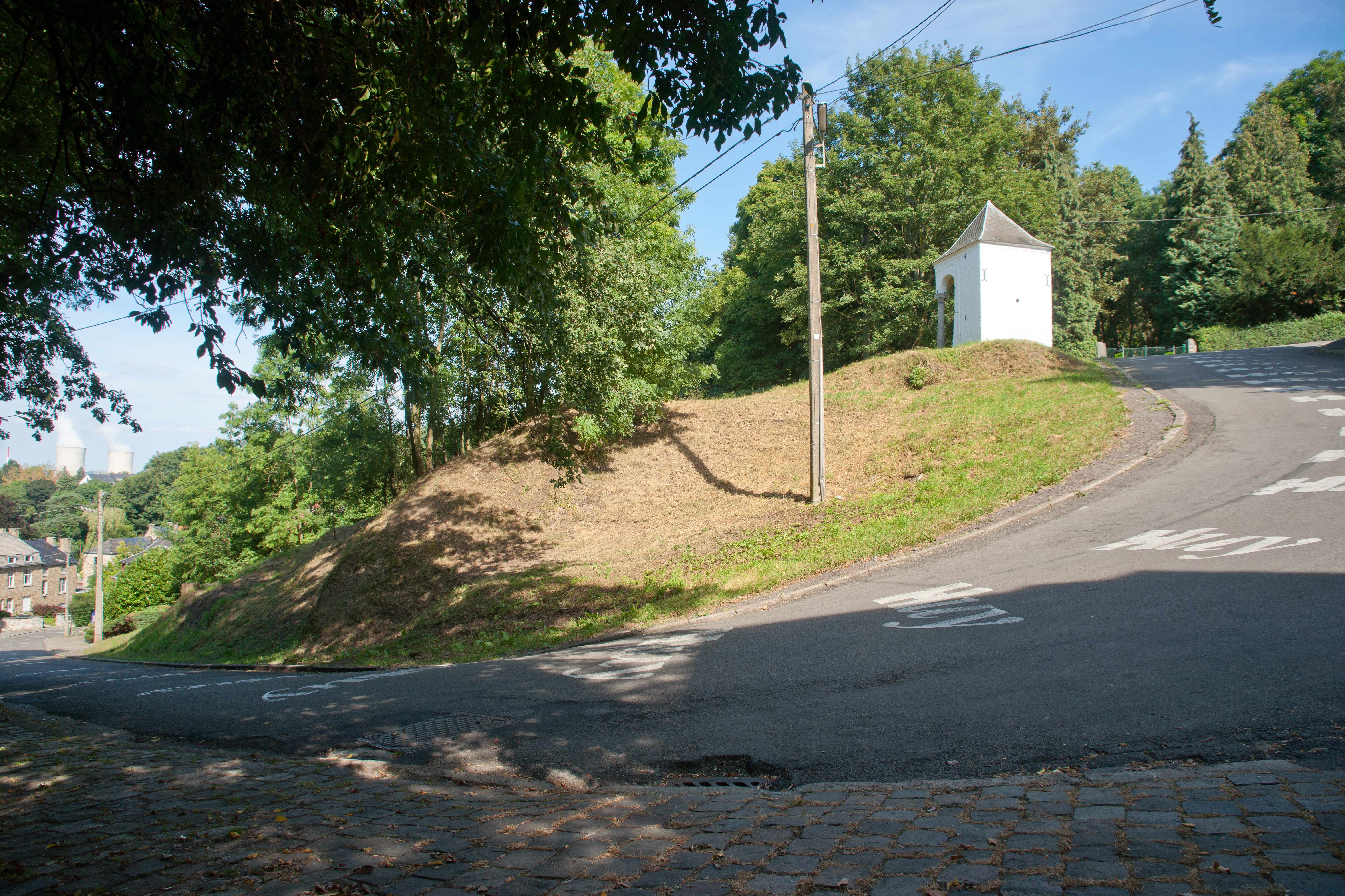 Huy - Chemin des chapelles - Chicane et chapelle 3